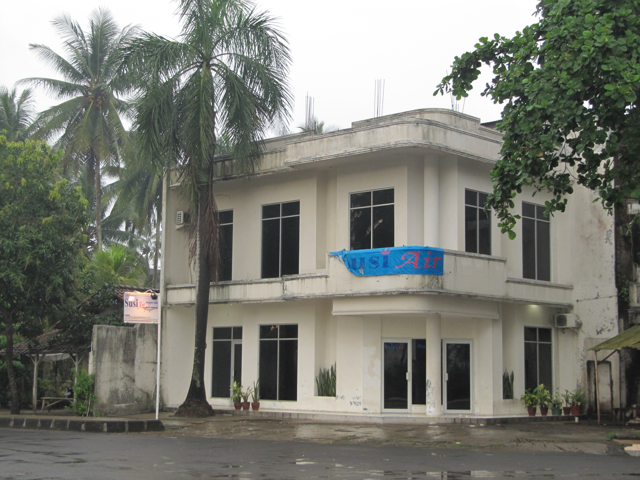 hoofdkantoor Susi Air